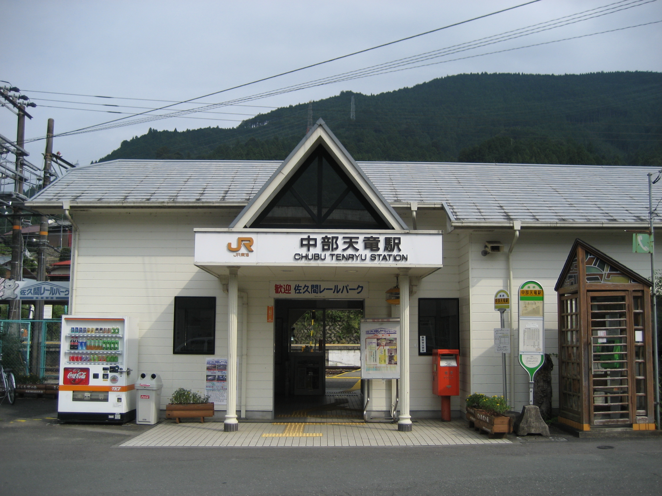 JR Chubu-Tenryu Sta.